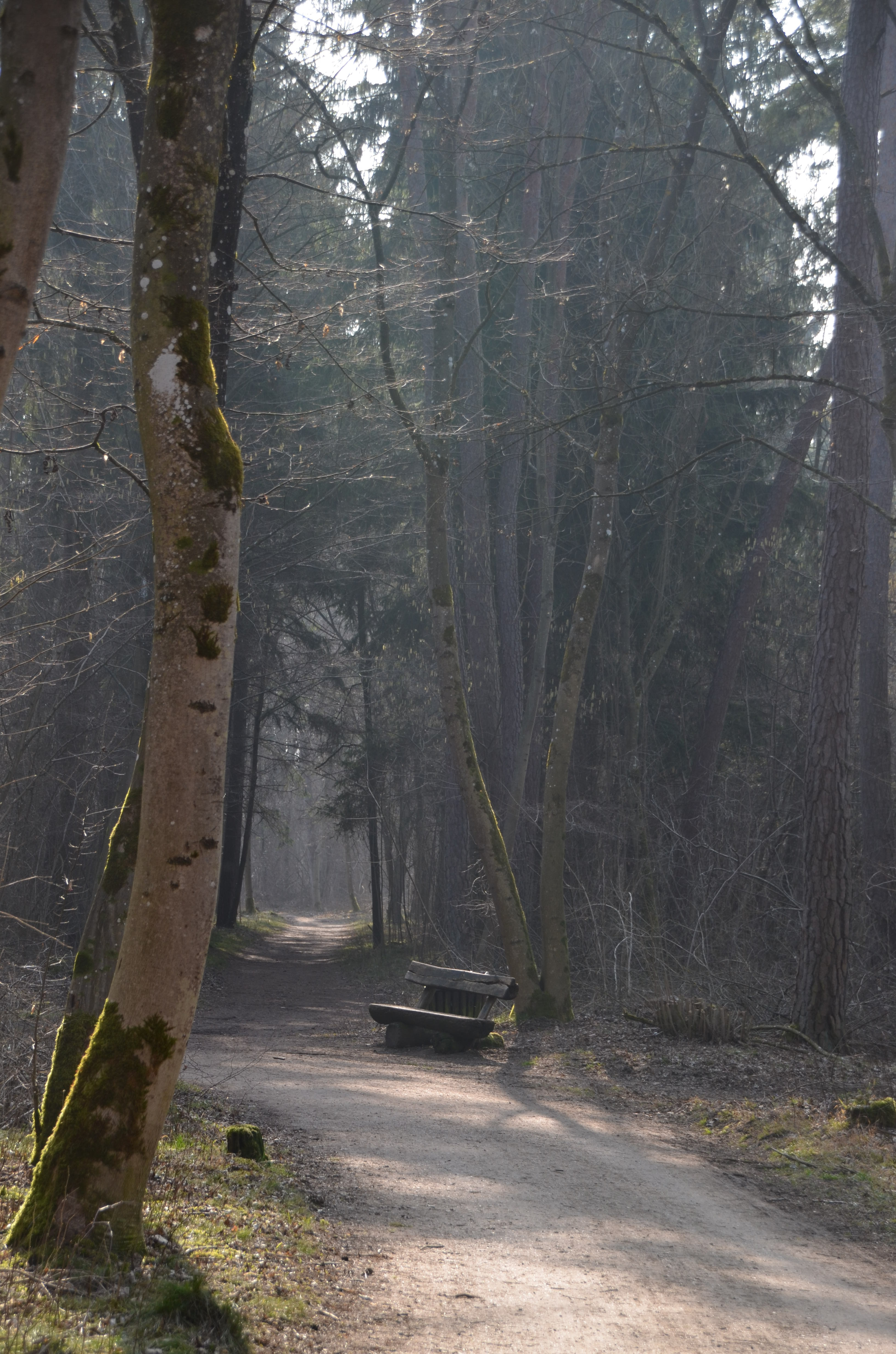 Zucheringer Wäldchen Ruhebank am Waldweg